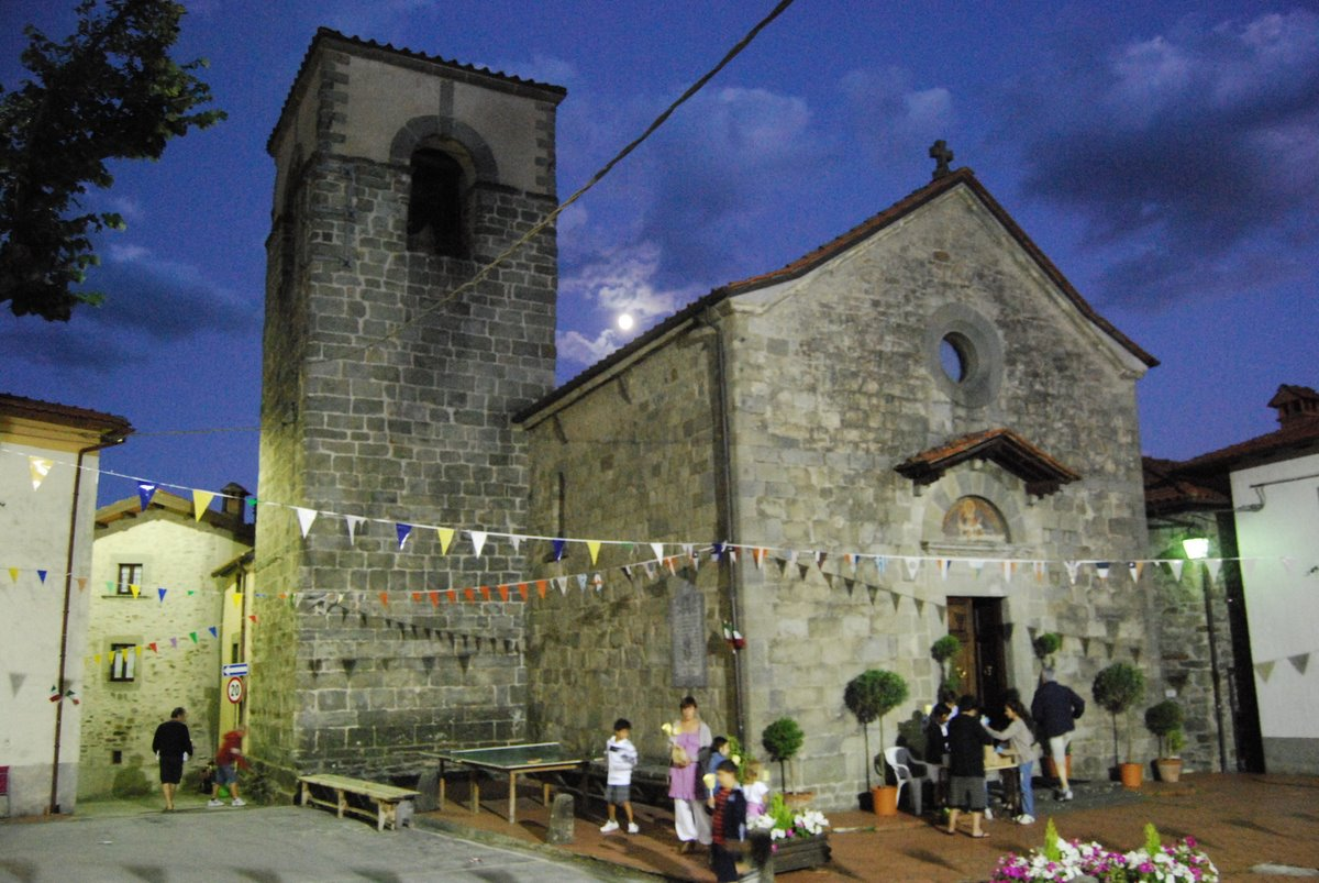 Chiesa di Spignana la sera della processione di San Lorenzo